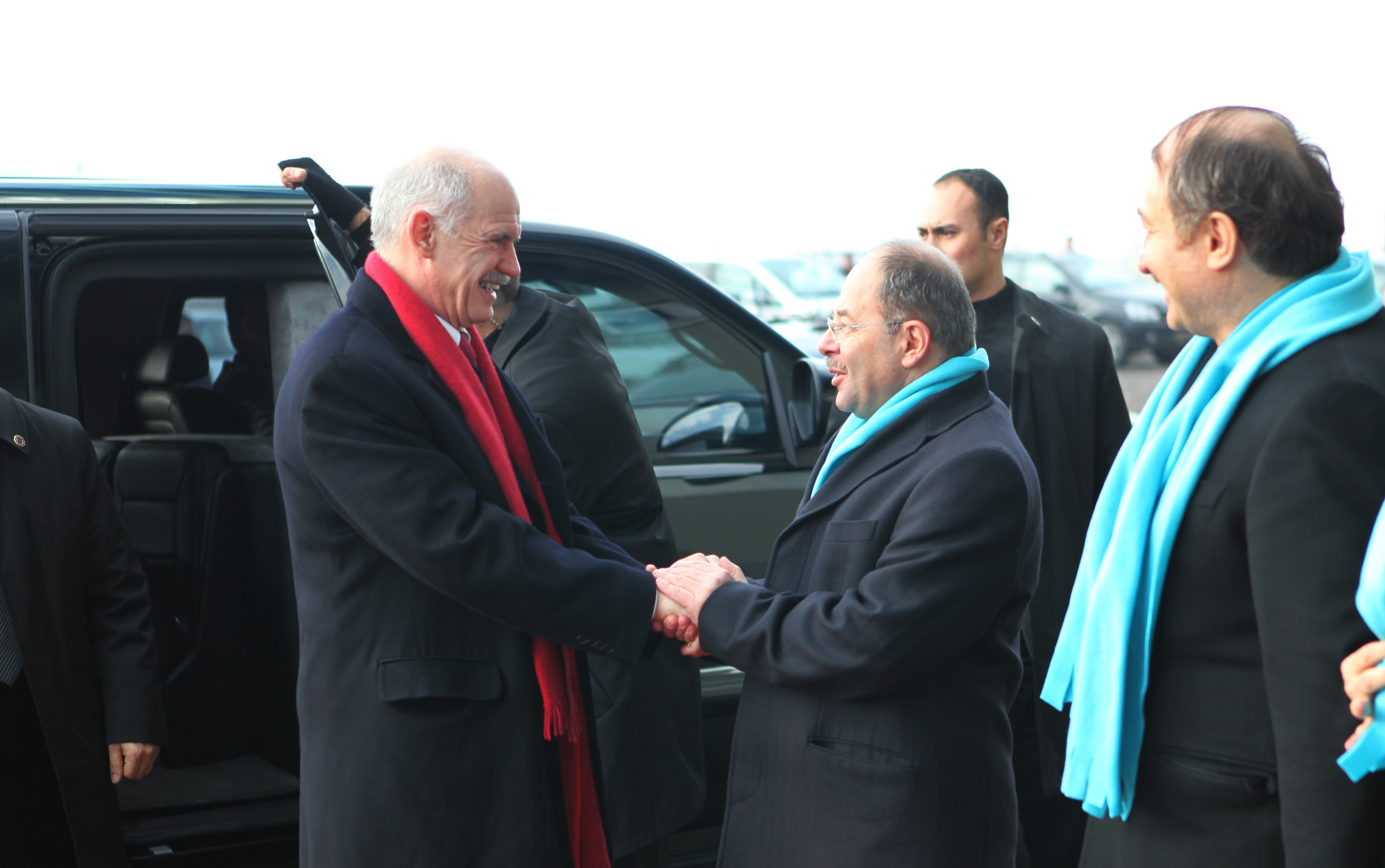 Recep Akdağ ve Yunanistan Başbakanı Yorgo Papandreu görüşme esnasında.